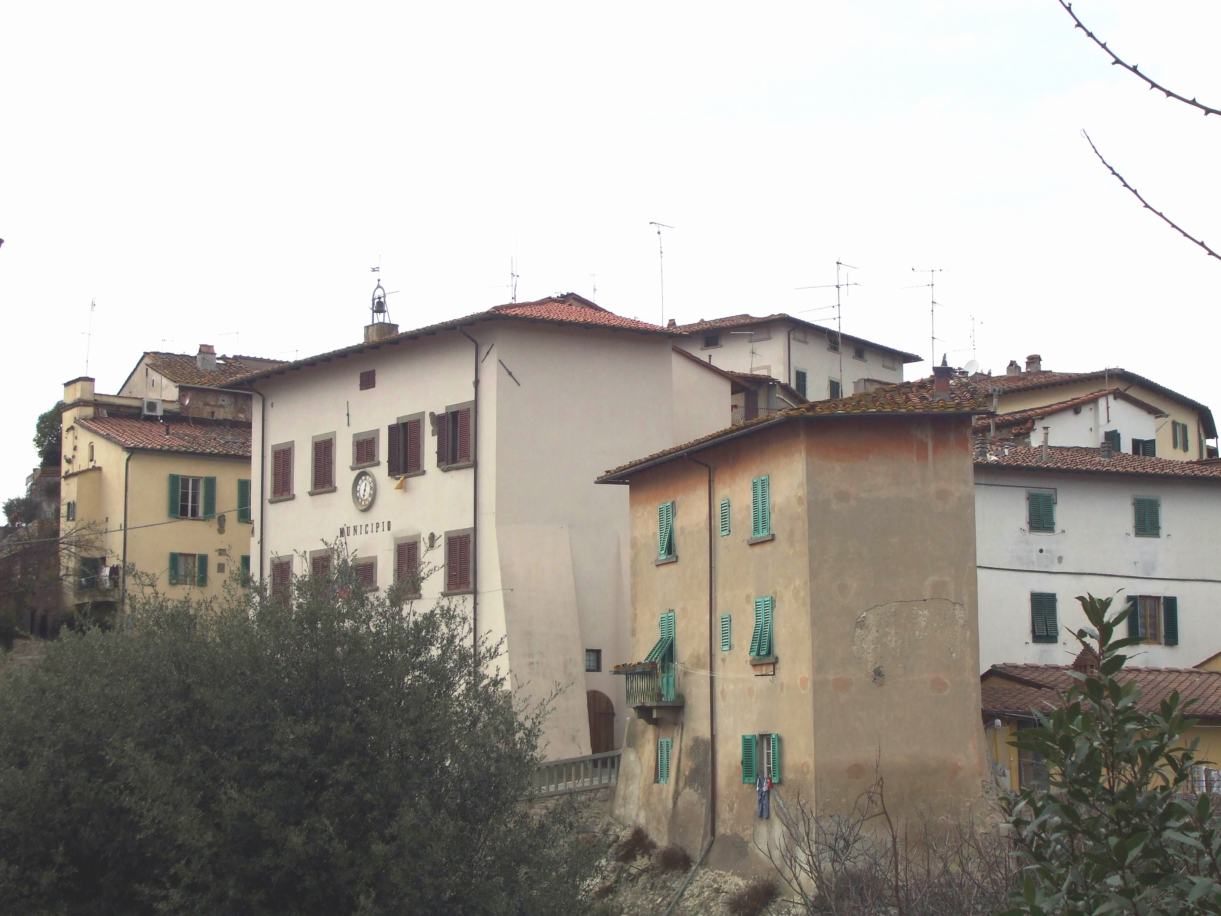 Bucine Municipio